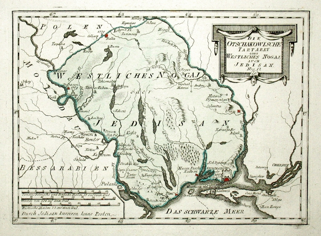 Die Otschakowische Tartarey oder Westliches Nogaj, auch Jedisan. Nro. 12. Kolorierter Kupferstich